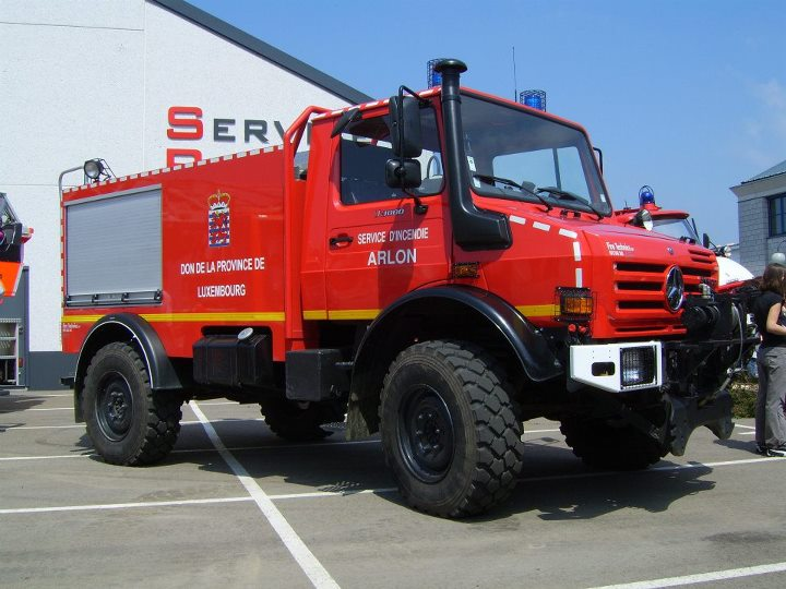 pompe 4x4 SRI Arlon